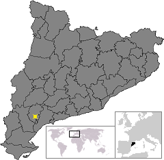 Localització de Falset. Location of Falset in Catalonia.